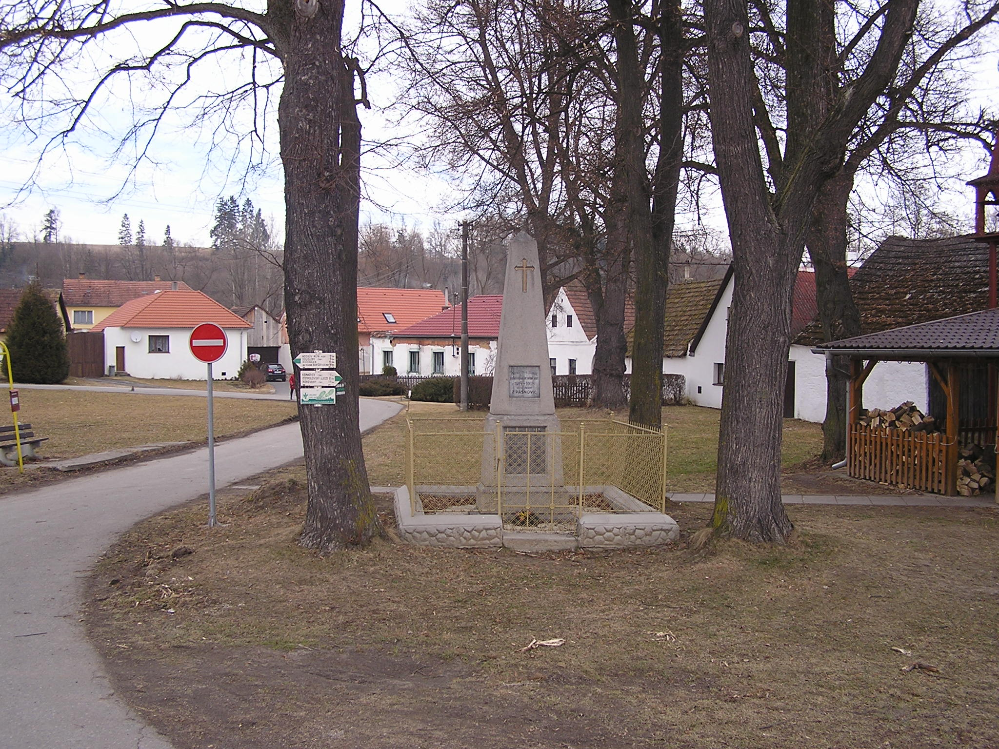 Pašinovice, náves